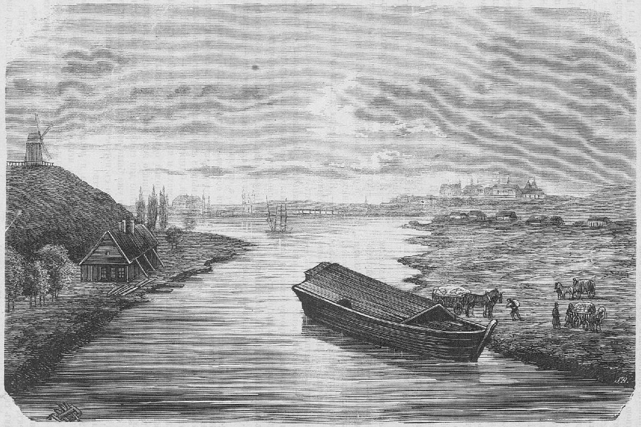 Беларуская (тарашкевіца): Слонім (Słonim), рака Шчара (Ščara)